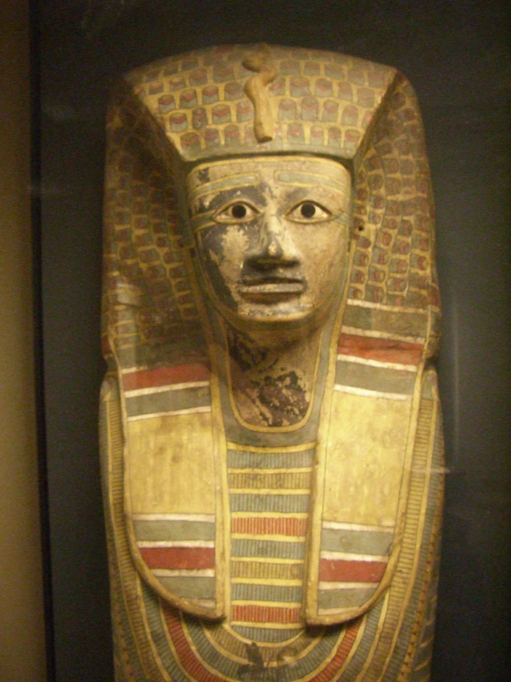 Détail du sarcophage du pharaon Antef (Sékhemrê Hérouhermaât) - XVIIe dynastie égyptienne - Musée du Louvre: [1]